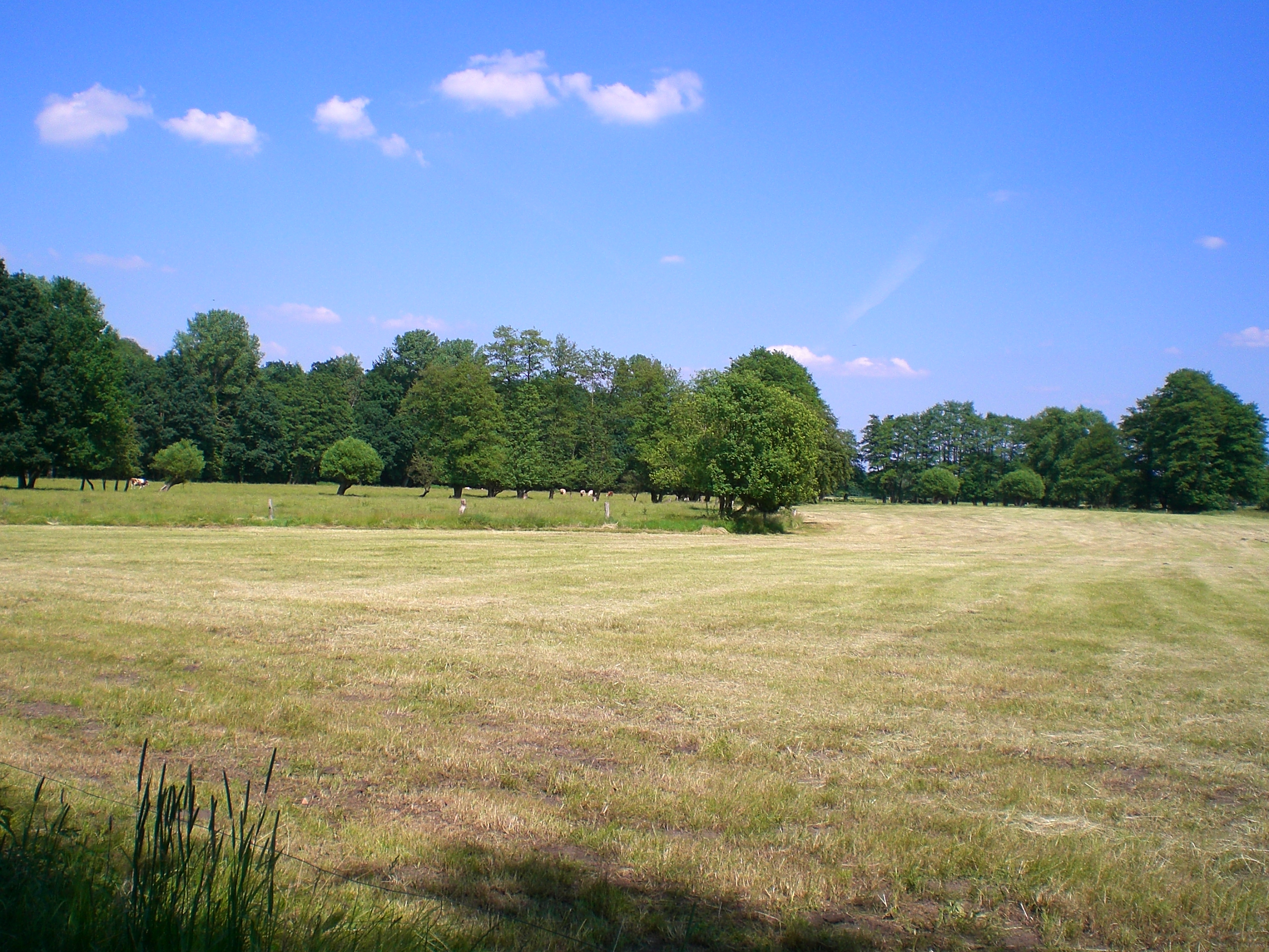 Blick auf eine typische Verler Weiden- und Wiesenlandschaft. Dies ist die so gennante Sürenwiese.